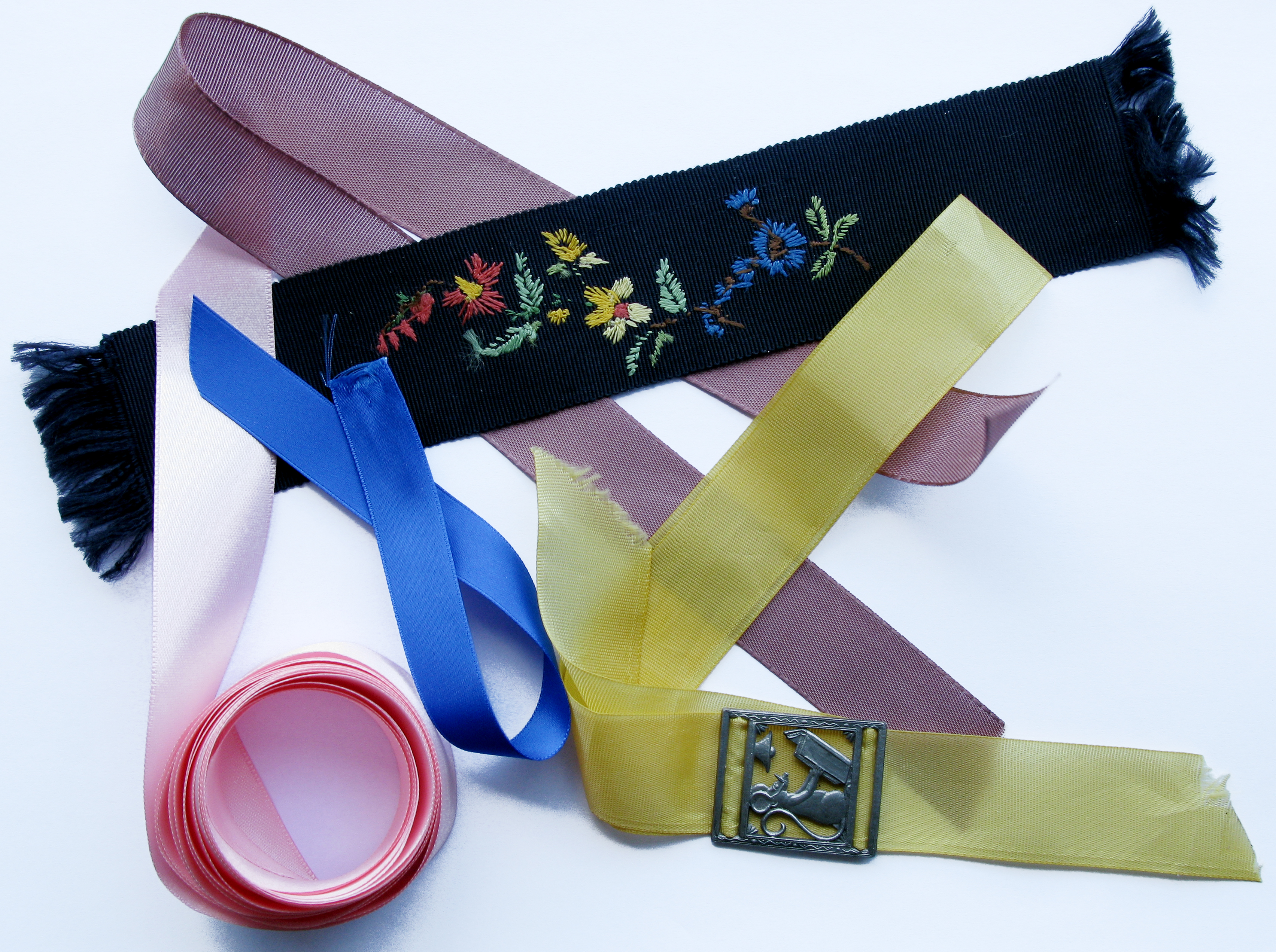 Unterschiedliche Gewebebänder: besticktes Lesezeichen, Geschenkbänder, Zierbänder.